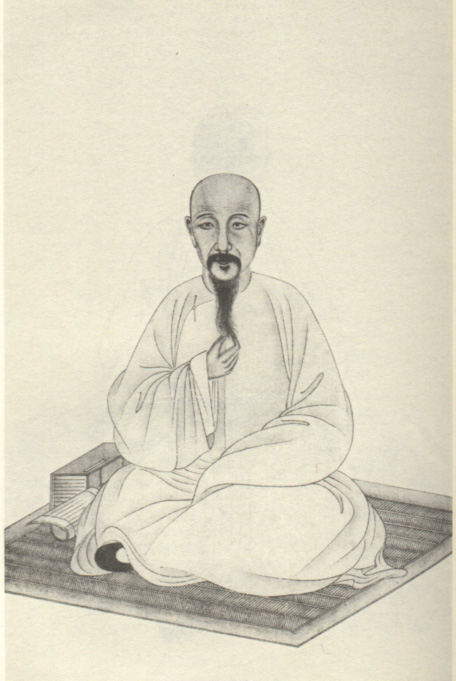 乔莱，清代学者。Qiao Lai